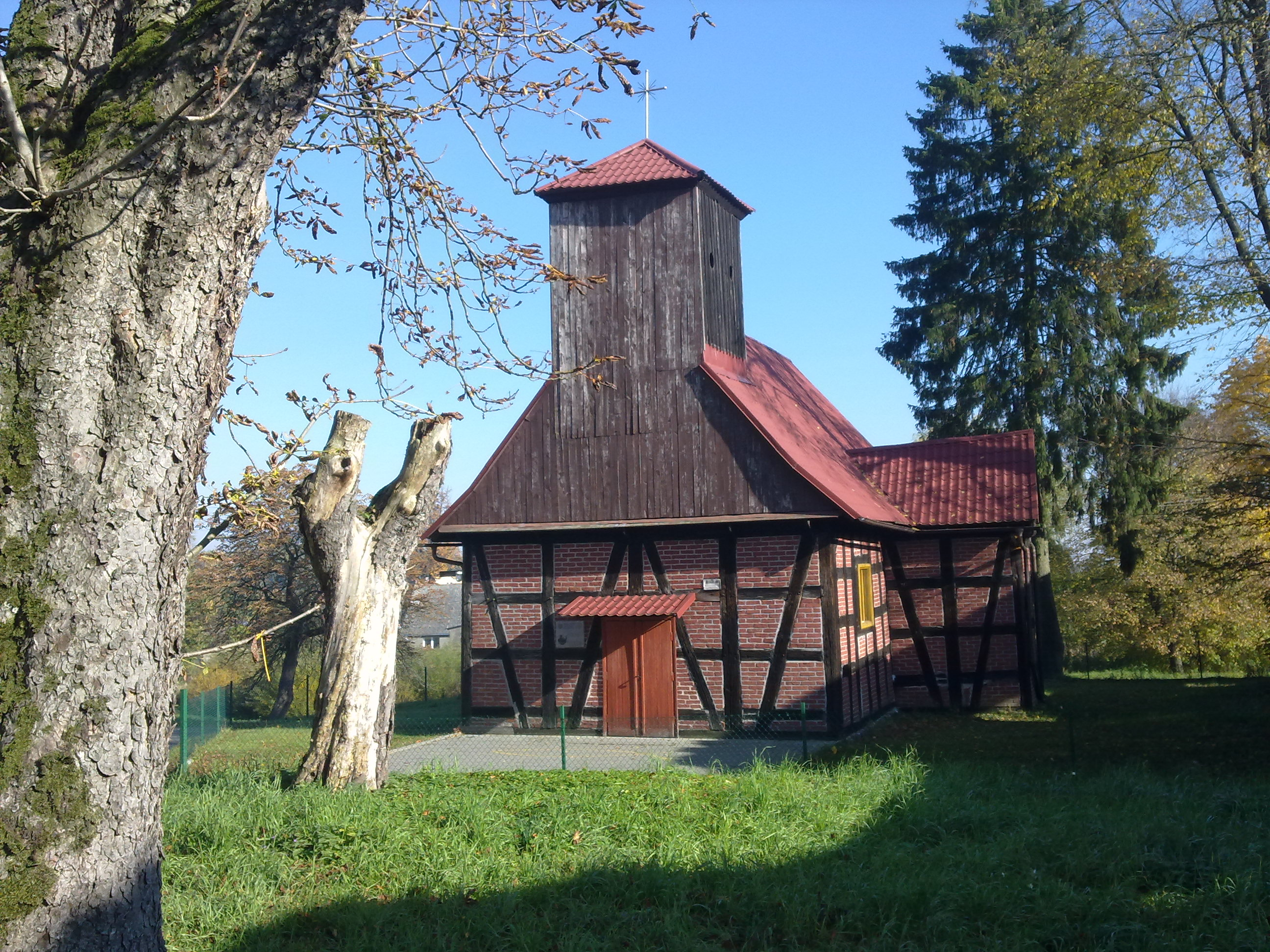 Górnica - dawny kościół ewangelicki, obecnie rzymskokatolicki filialny p.w. MB Królowej Polski, 1672